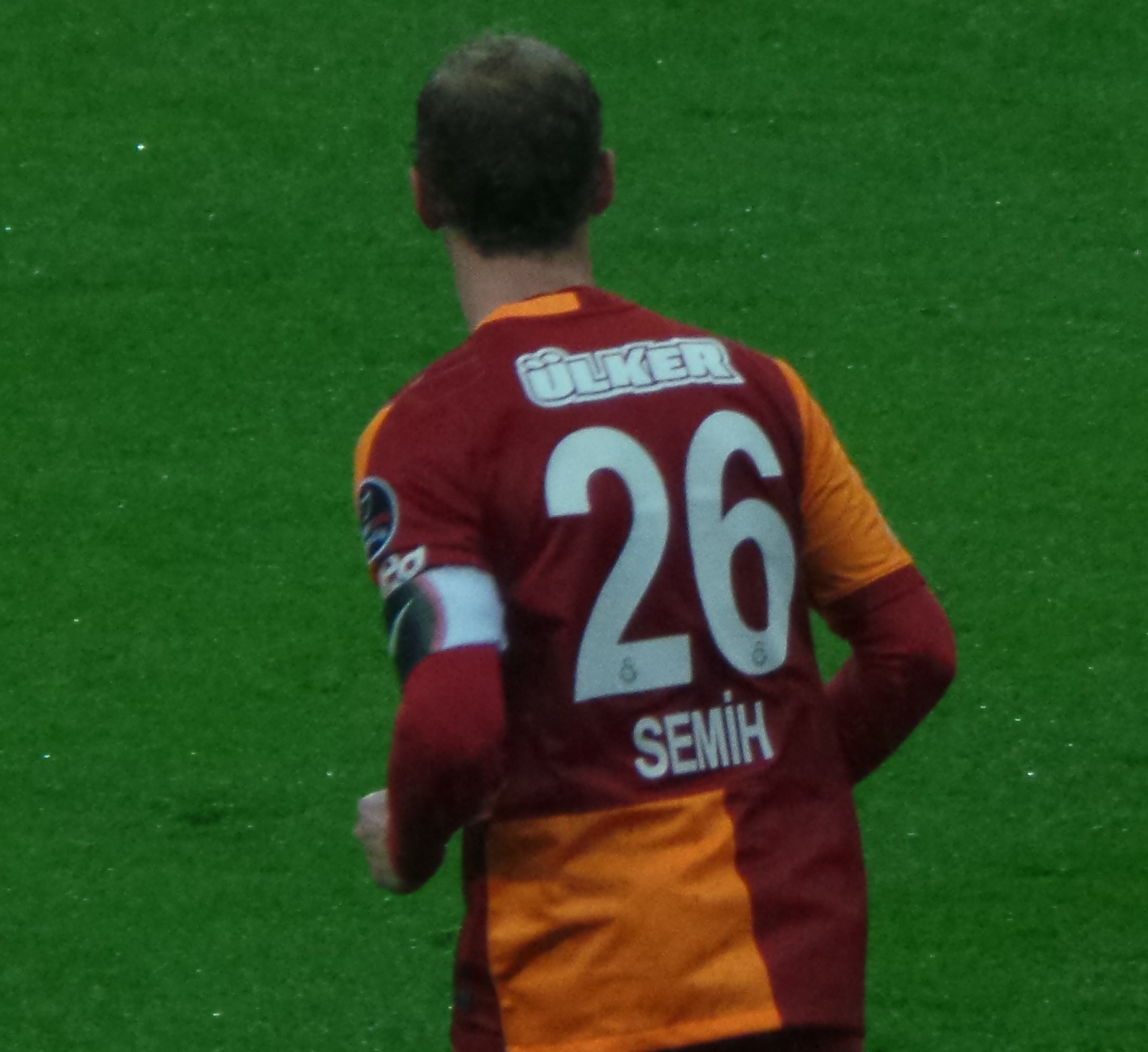 Semih Kaya kaptanlık pazubandı ile